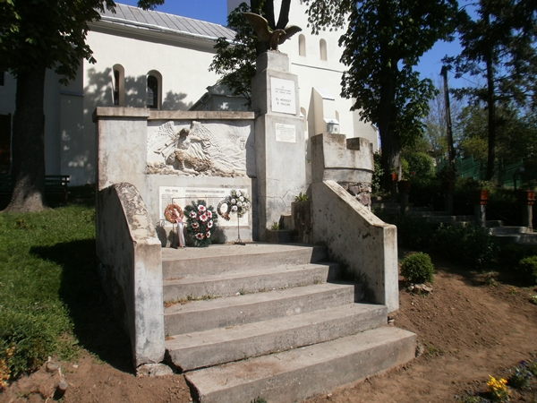 Turulmadaras emlékmű, Albis, Románia